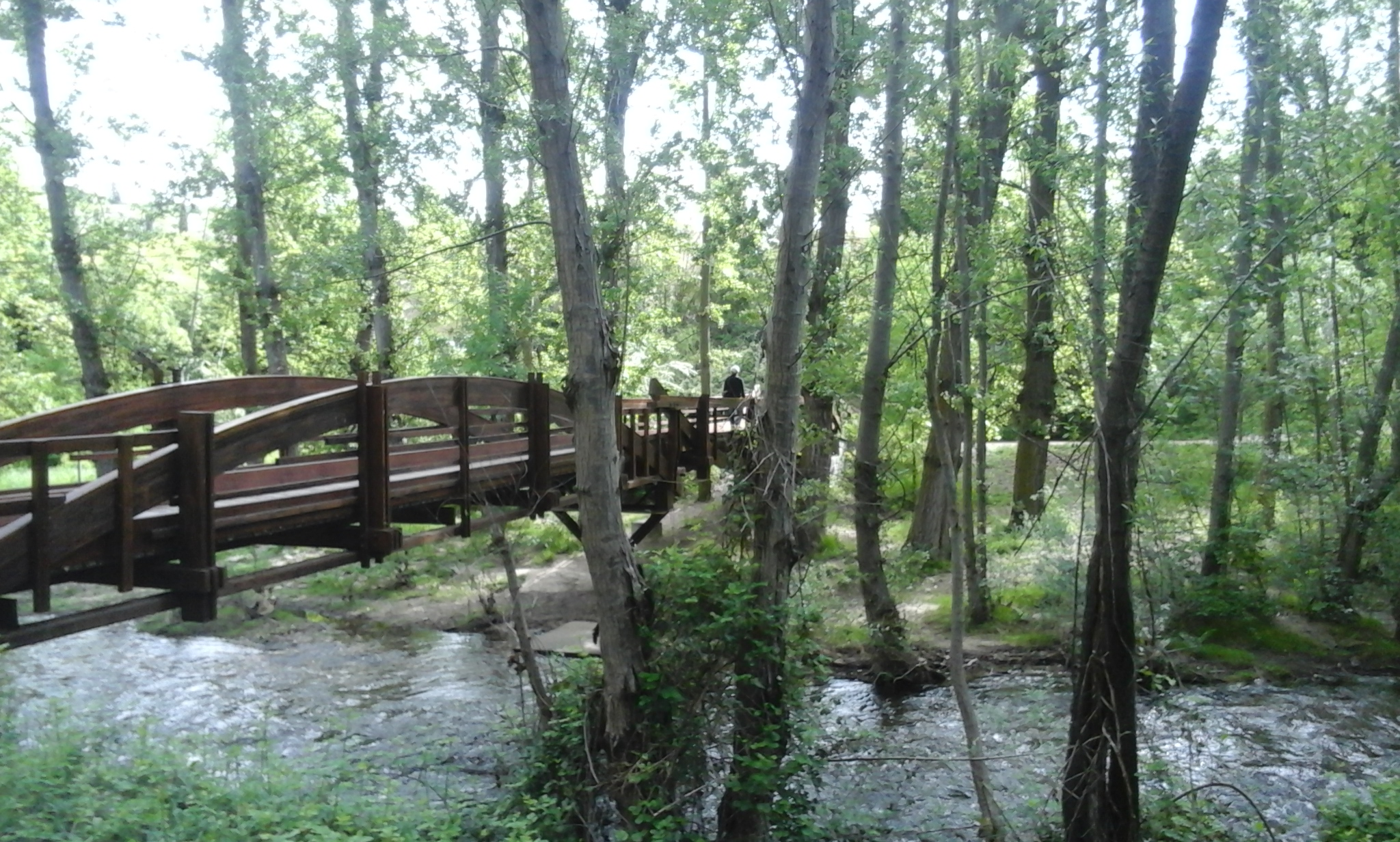 el valle del Clamores (Segovia) viendo el puente